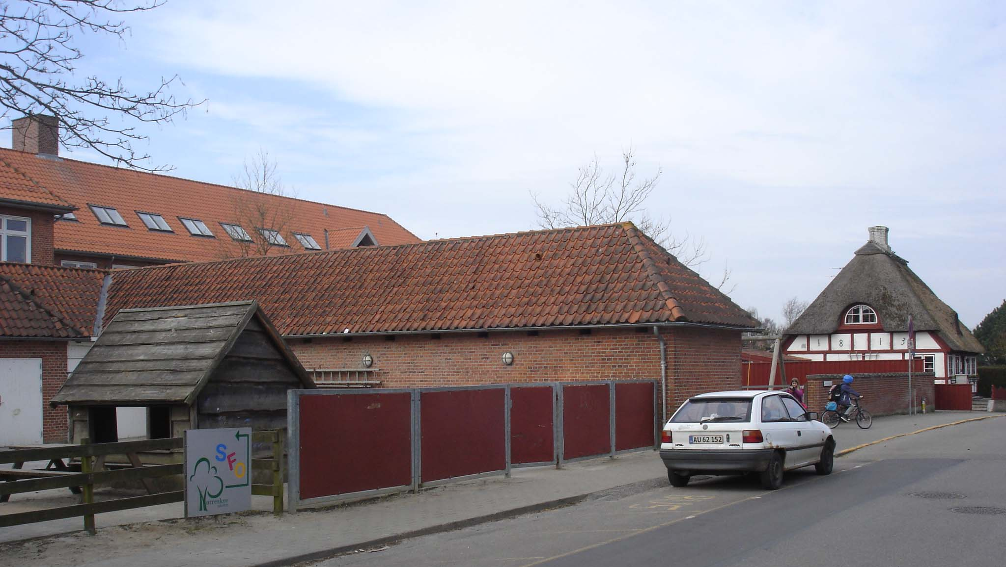 Nørreskov Skolen i Guderup